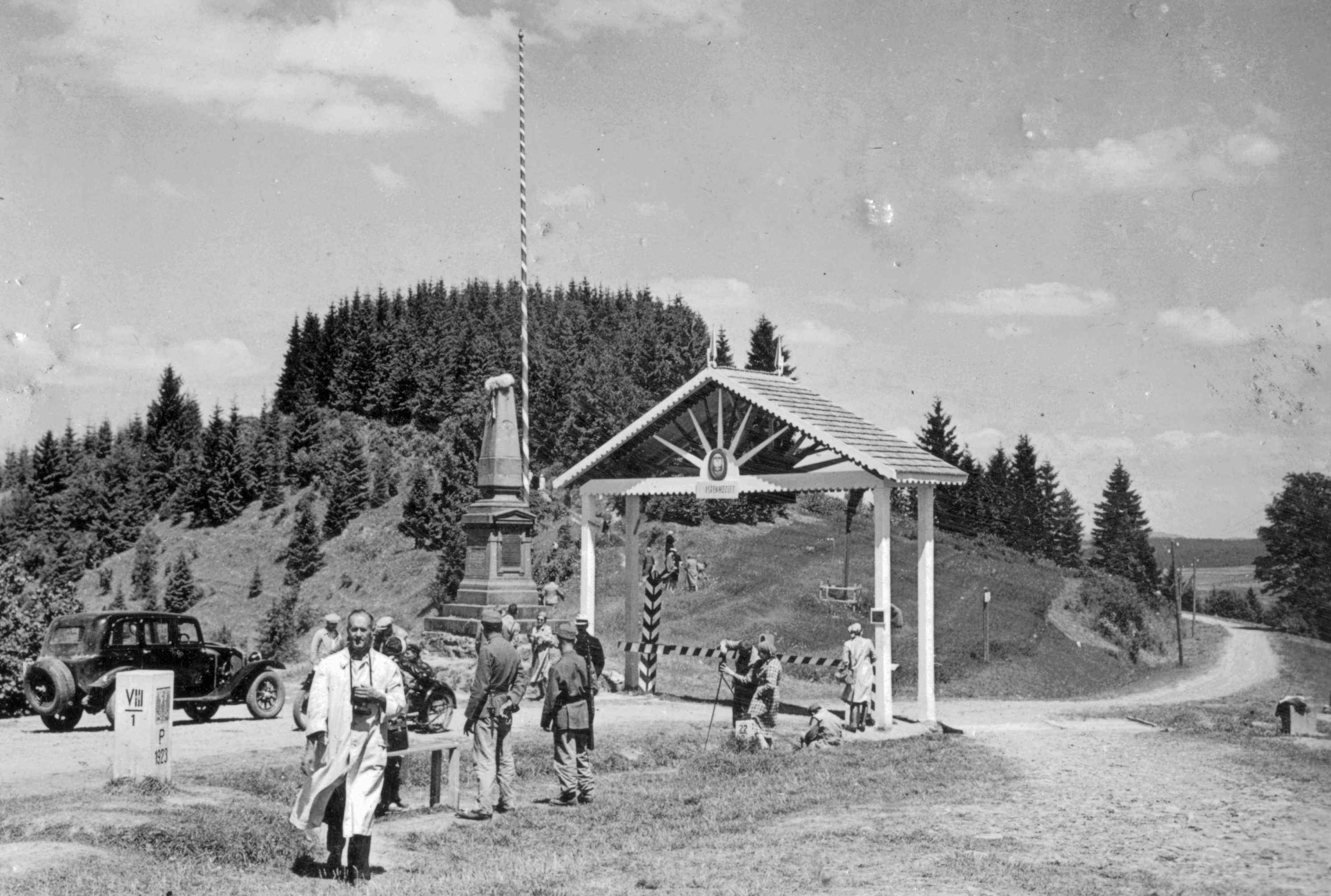 a Millennium idején felállított emlékobeliszk (1950-ben elbontották) és a győzelmi kapu. Location: Ukraine, pereval Szerednyovereckij Tags: milestone, border crossing Title: a Millennium idején felállított emlékobeliszk (1950-ben elbontották) és a győzelmi kapu.